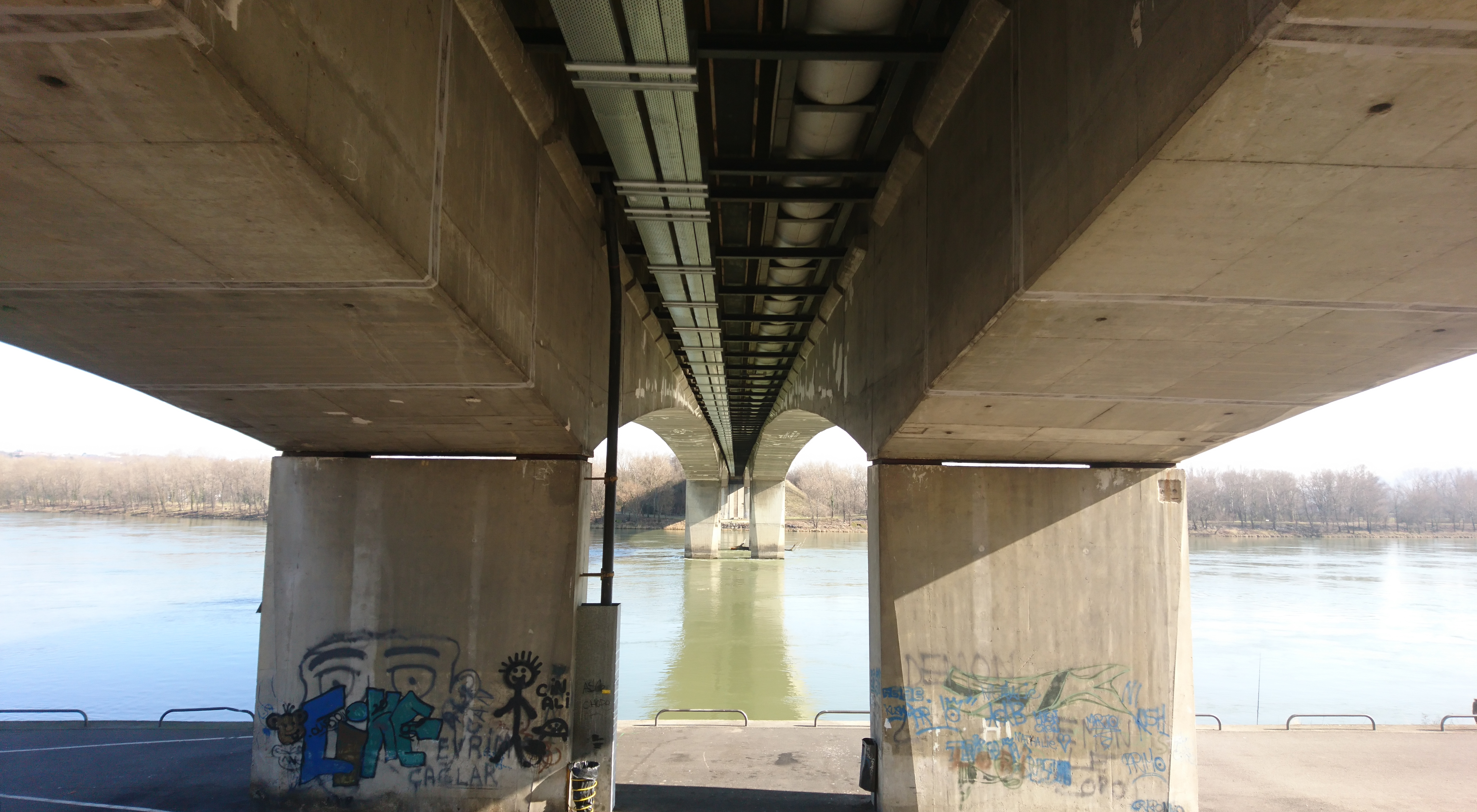 Vue du dessous du pont autoroutier de Givors du côté de la rive droite du Rhône.